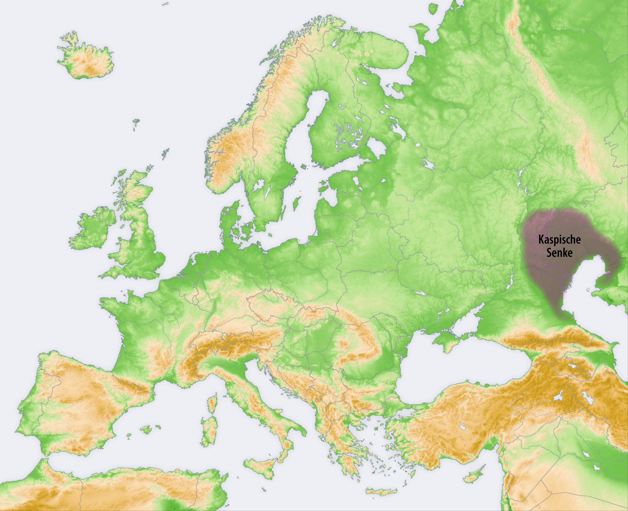 Landschaften der Osteuropäischen Ebene: Kaspische Senke